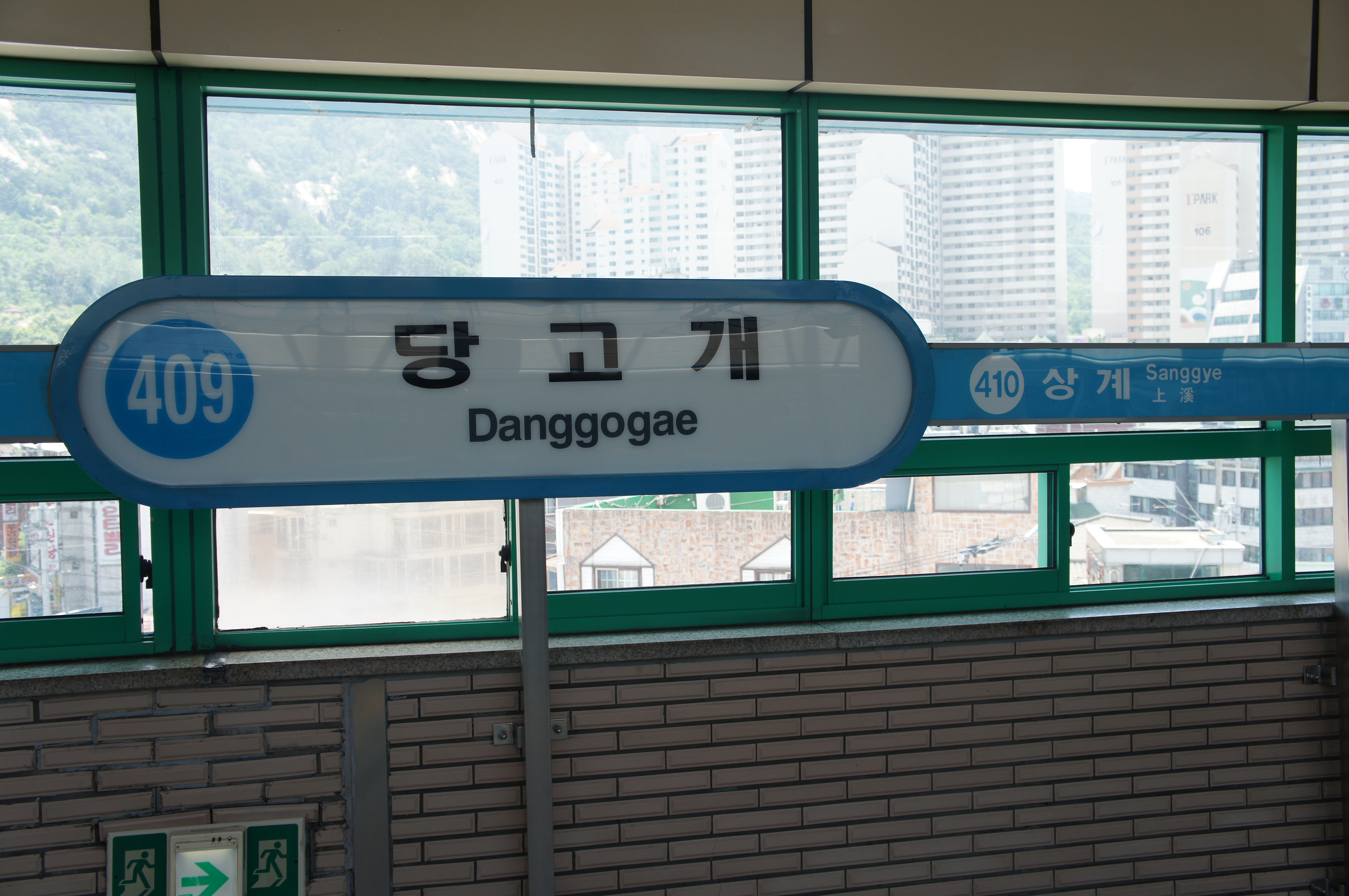 당고개역 역명판